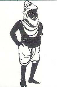 Saints of India, taught the Tamils to find God within their-self, not in temples, through his lyric poems in Tamil. A book by name “theiva Alai”, author Sengai Pothuvan, published in 2007.